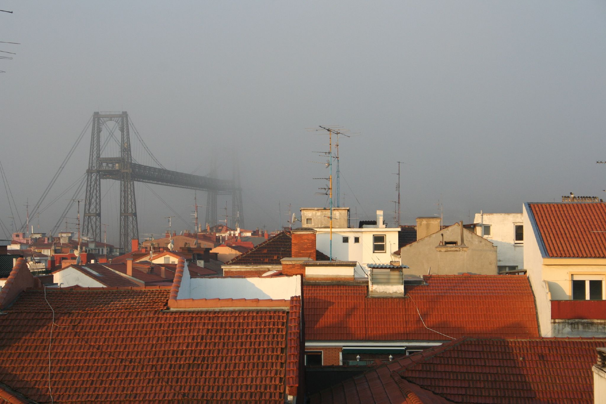 Bizkaiko Zubia behelainoarekin.Playa de Las Arena (Rojizo)